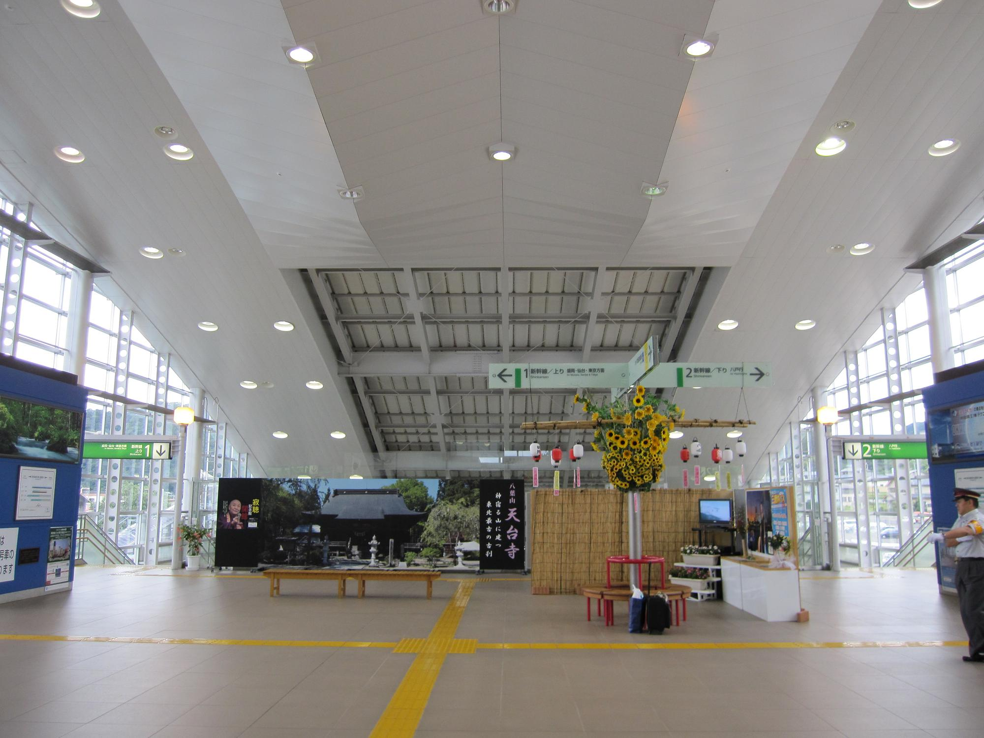 東北新幹線・二戸駅改札内コンコース